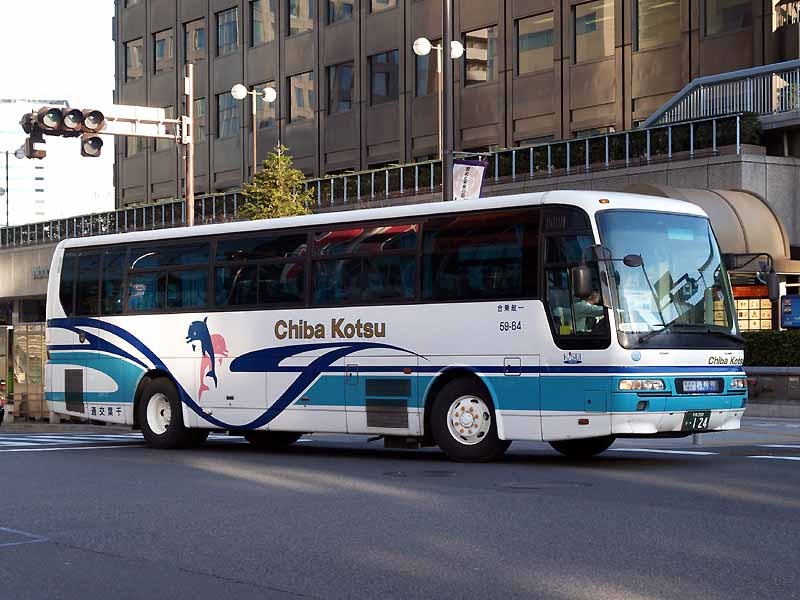 千葉交通の高速バス。浜松町～銚子線は主に側面にイルカが描かれた車両が投入される。 千葉200か・124（社番59-84、配置先不明） 三菱ふそうエアロバス(KC-MS829P) 2007年3月18日、東京都港区浜松町にてComyu撮影。